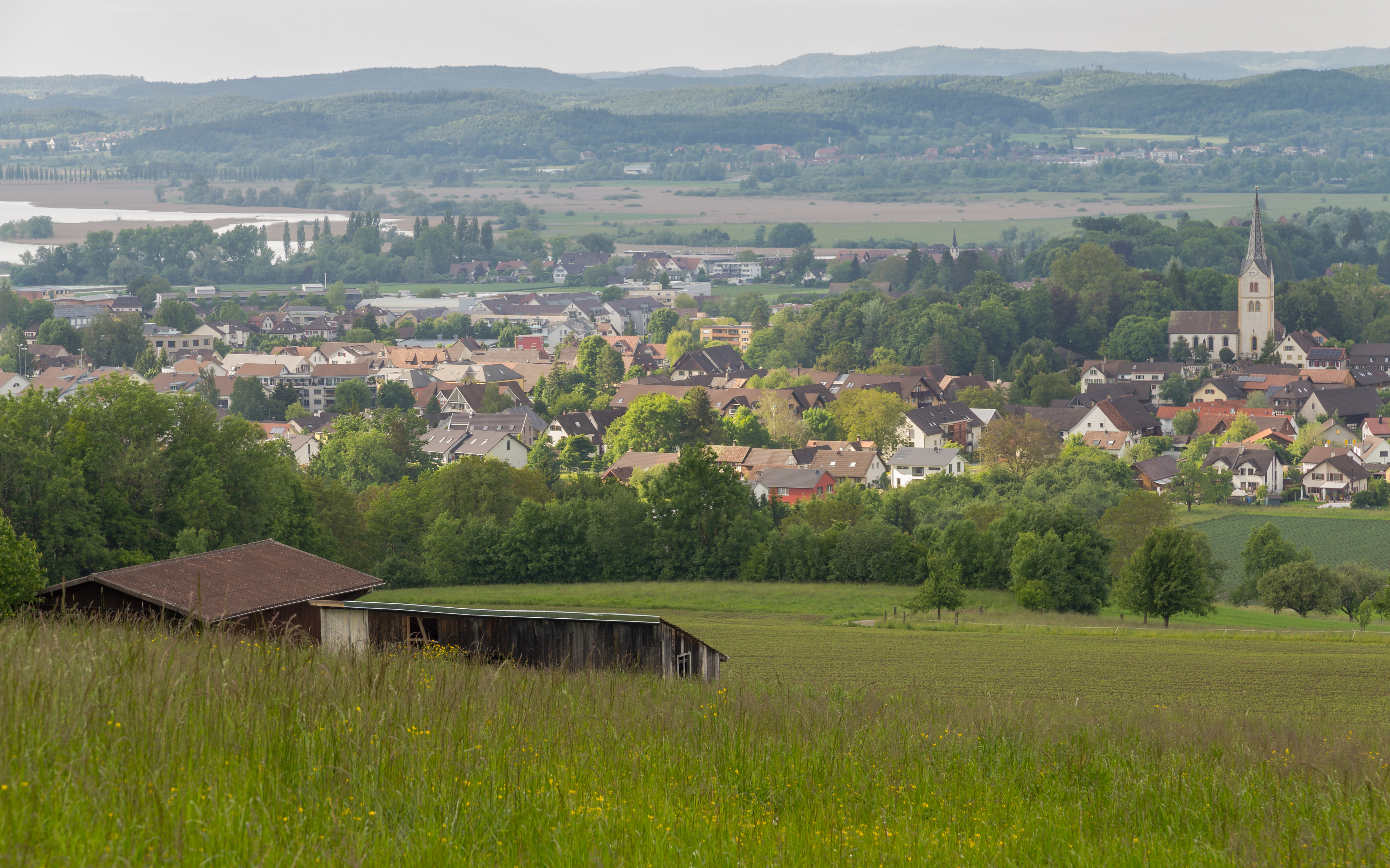 Blick auf Tägerwilen